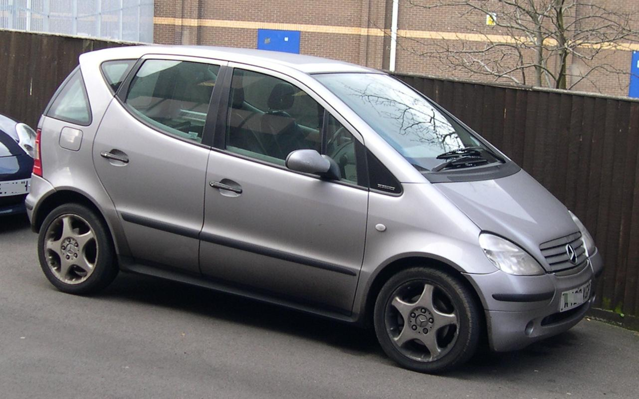 Mercedes-Benz W168 A190